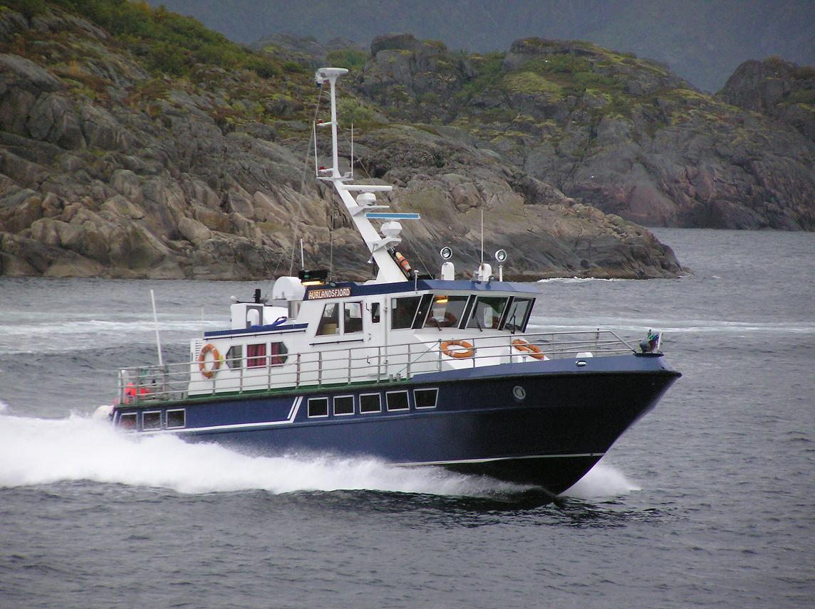 M/S «Aurlandsfjord» i Kabelvåg, 2004.